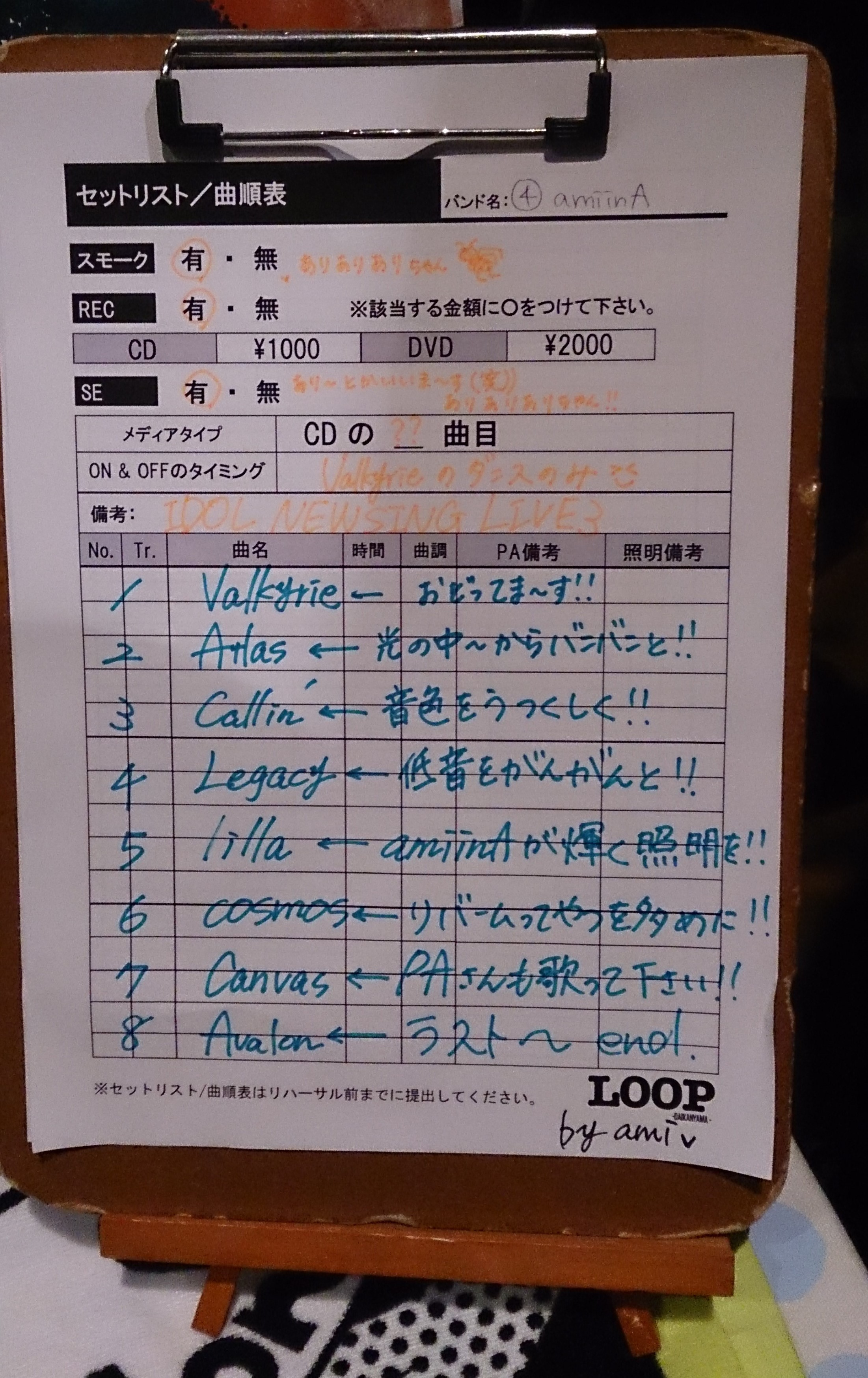 amiinAセトリボード(20170917(1))